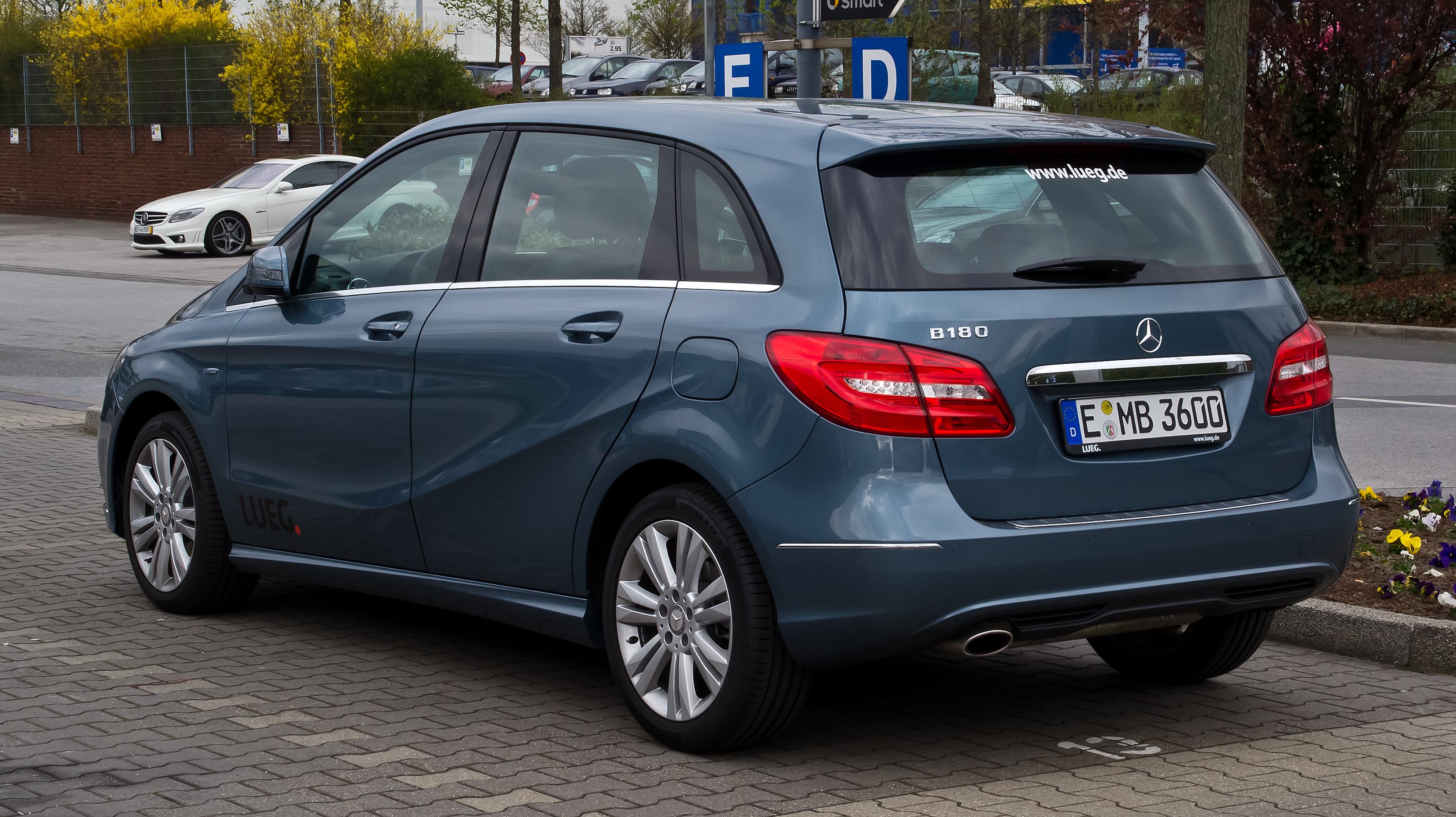 Mercedes-Benz B 180 BlueEFFICIENCY (W 246)